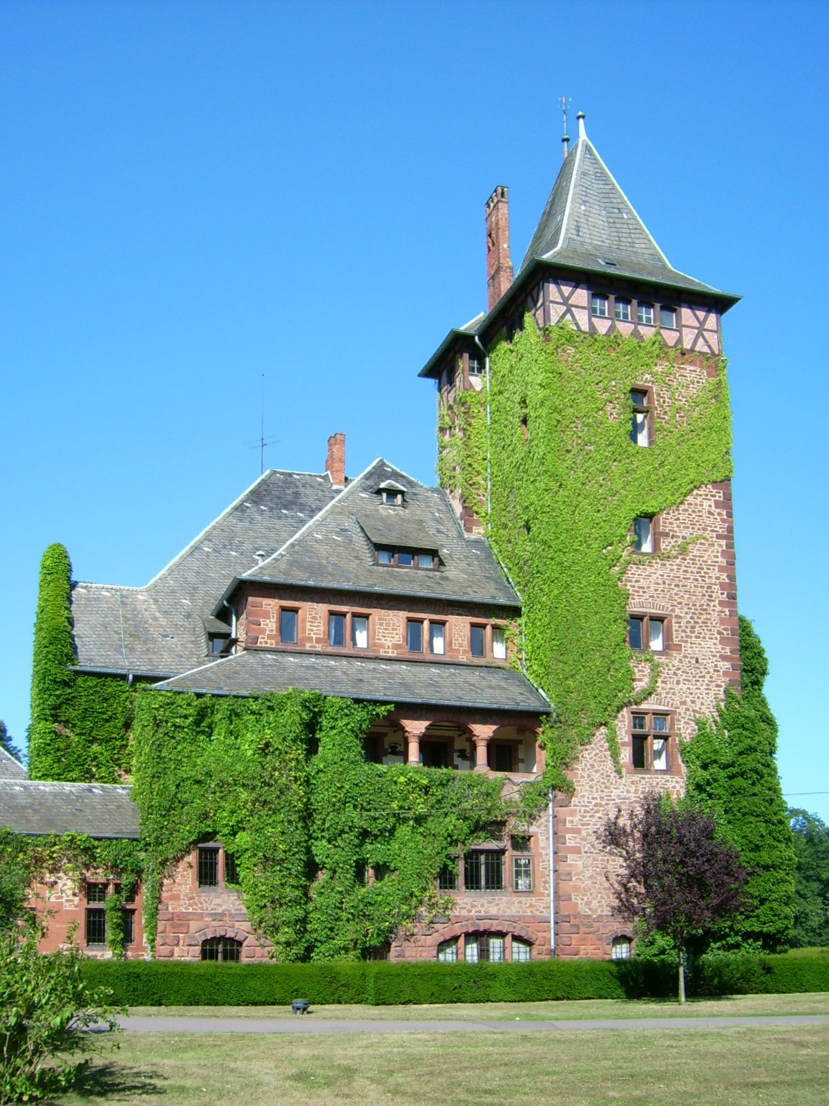 Schloss Saareck, Gästehaus Villeroy & Boch